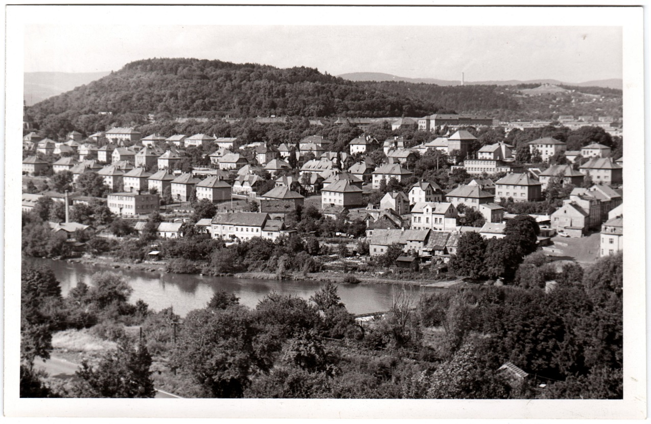 Vilová čtvrť Zahradní Město v Kadani okolo roku 1960